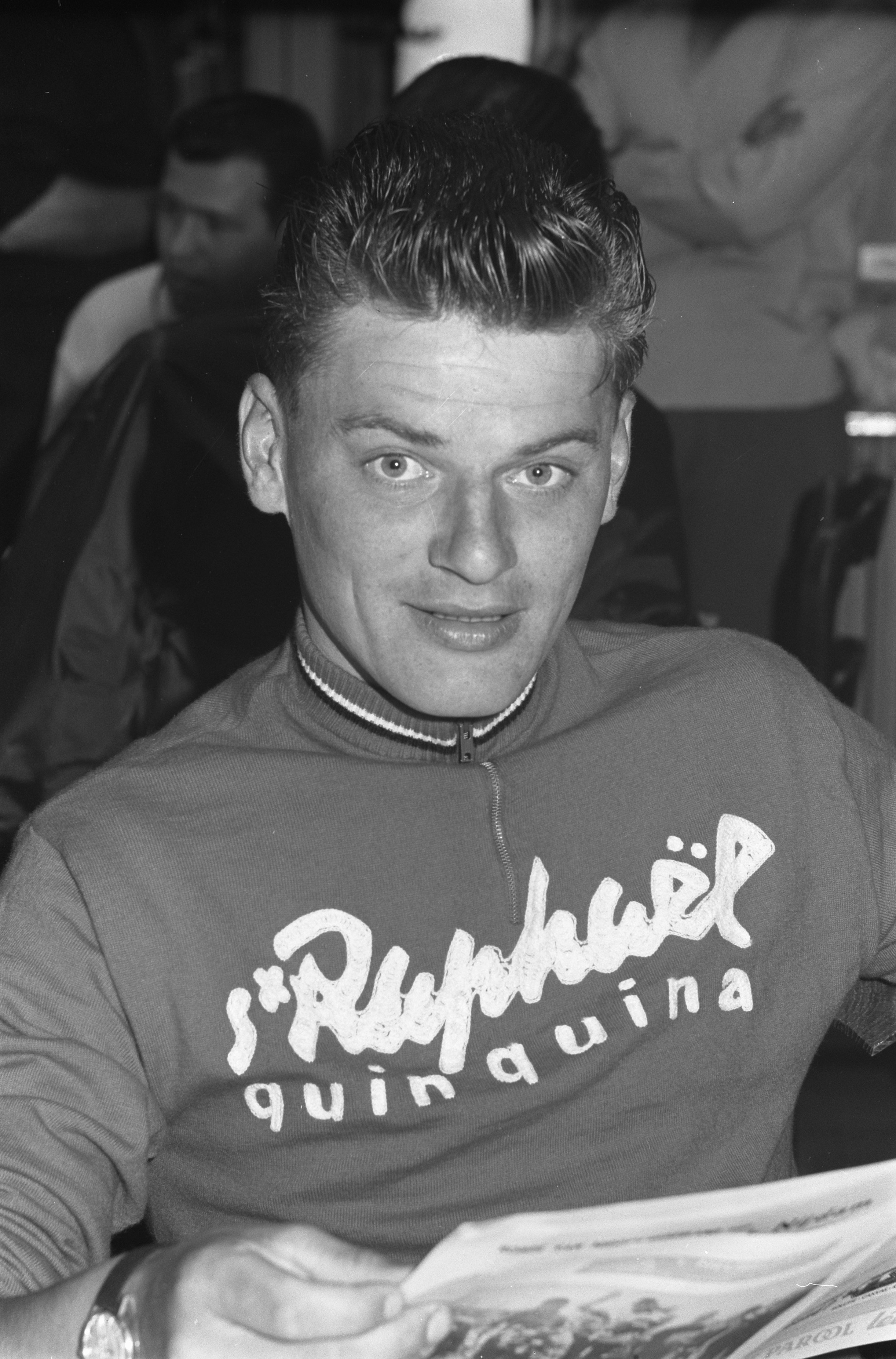 Collectie / Archief : Fotocollectie Anefo Reportage / Serie : Tour de France 1961 Beschrijving : Jo de Haan Datum : 23 juni 1961 Locatie : Frankrijk, Parijs Trefwoorden : wielrenners Persoonsnaam : Haan, Jo de Instellingsnaam : Tour de France Fotograaf : Harry Pot / Anefo, [onbekend] Auteursrechthebbende : Nationaal Archief Materiaalsoort : Negatief (zwart/wit) Nummer archiefinventaris : bekijk toegang 2.24.01.05 Bestanddeelnummer : 912-6703